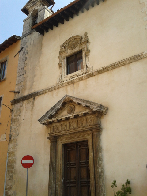 Chiesa di San Giovanni Decollato (Misericordia)